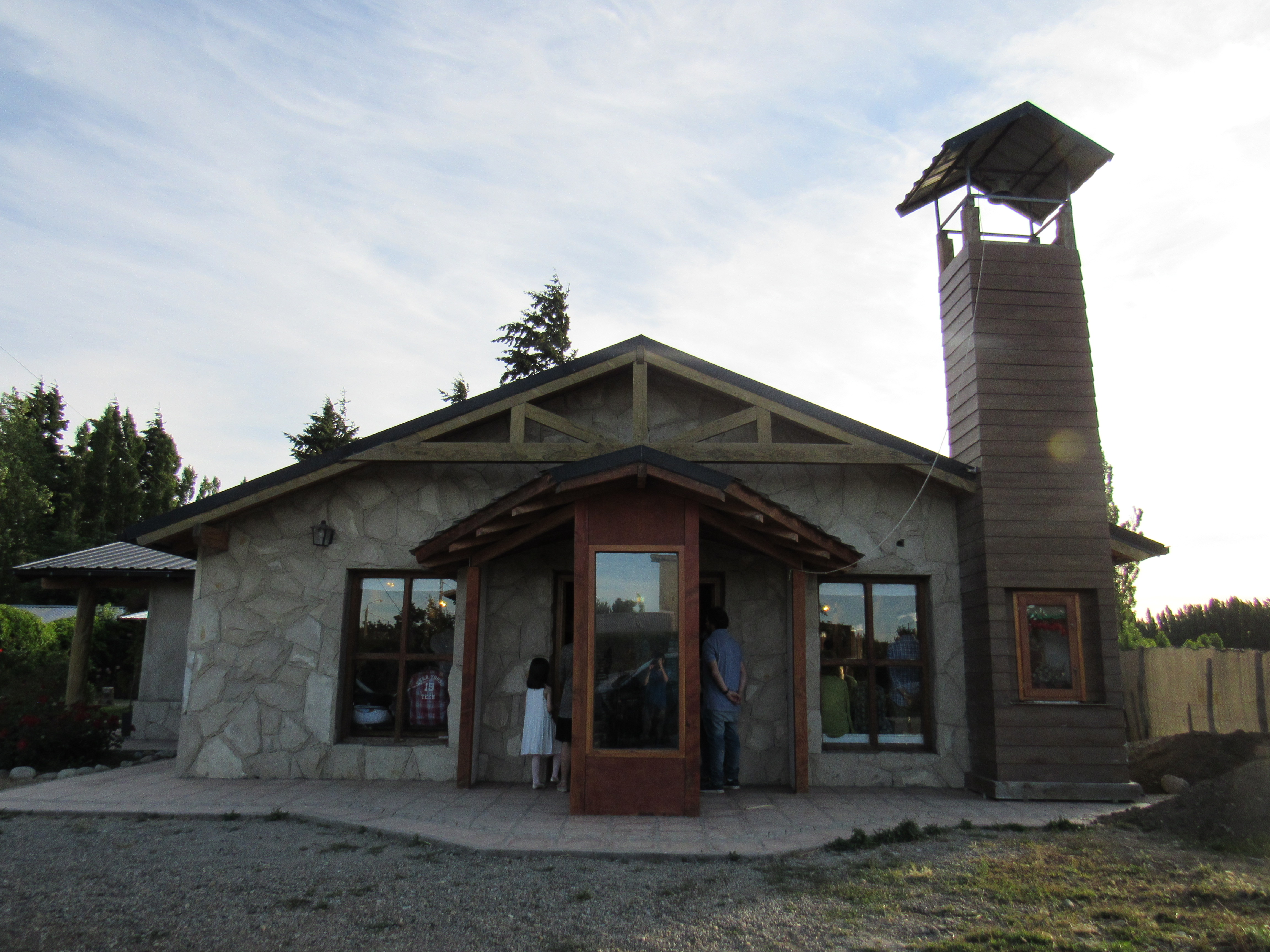 Parroquia San José, Dina Huapi, Río Negro, Argentina